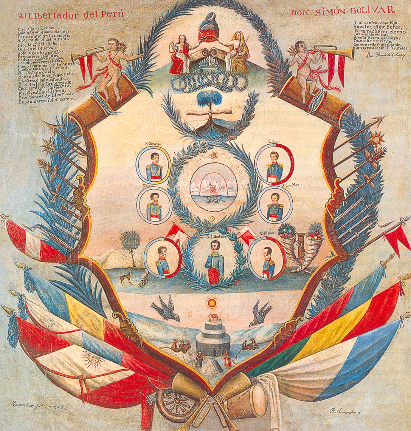 Cuadro alegórico sobre presencia bolivariana en el Cuzco Al Libertador del Perú, Don Simón Bolívar Dice la Fama Señor: Que hay muy pocos clarines, Para anunciar tu nombre, A los pueblos del mundo. Dice la gloria Señor: Que en el Olimpo Solo lugar hay para Vos, Porque eres casi Dios. Bolívar pronuncian todos, Los idiomas regocijados, I todo el mundo con tu nombre, Cantan loas a la libertad, Que diste en Junín, Consolidaste en Ayacucho, Te ofrezco este Escudo, Para Patria tan grande Que contigo asiganta, En él está su historia, Sus padres de Libertad, Sus inmarcesibles laureles, Y al centro como Eje, Vuestra efigie Señor, Para recuerdo eterno De tu grata visita, A esta tierra gloriosa, Que ciñe tu frente, De vencedor infatigable, Con corona de oro i laureles. Juan Bautista Zuliaga